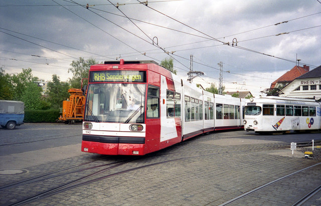 Rhein Haardt Bahn tramways